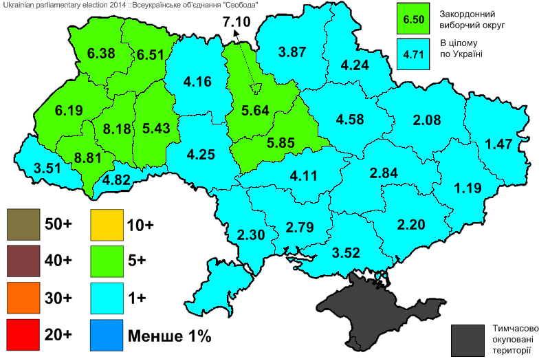 Результати виборів до Верховної Ради України, які відбулись 25 жовтня 2014 року. Інформація з офіційного сайту ЦВК.